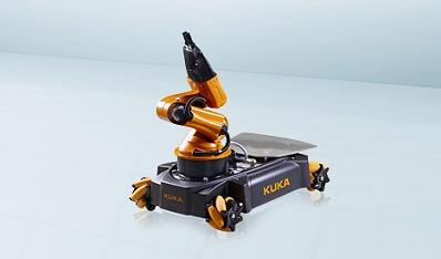 KUKA youBot